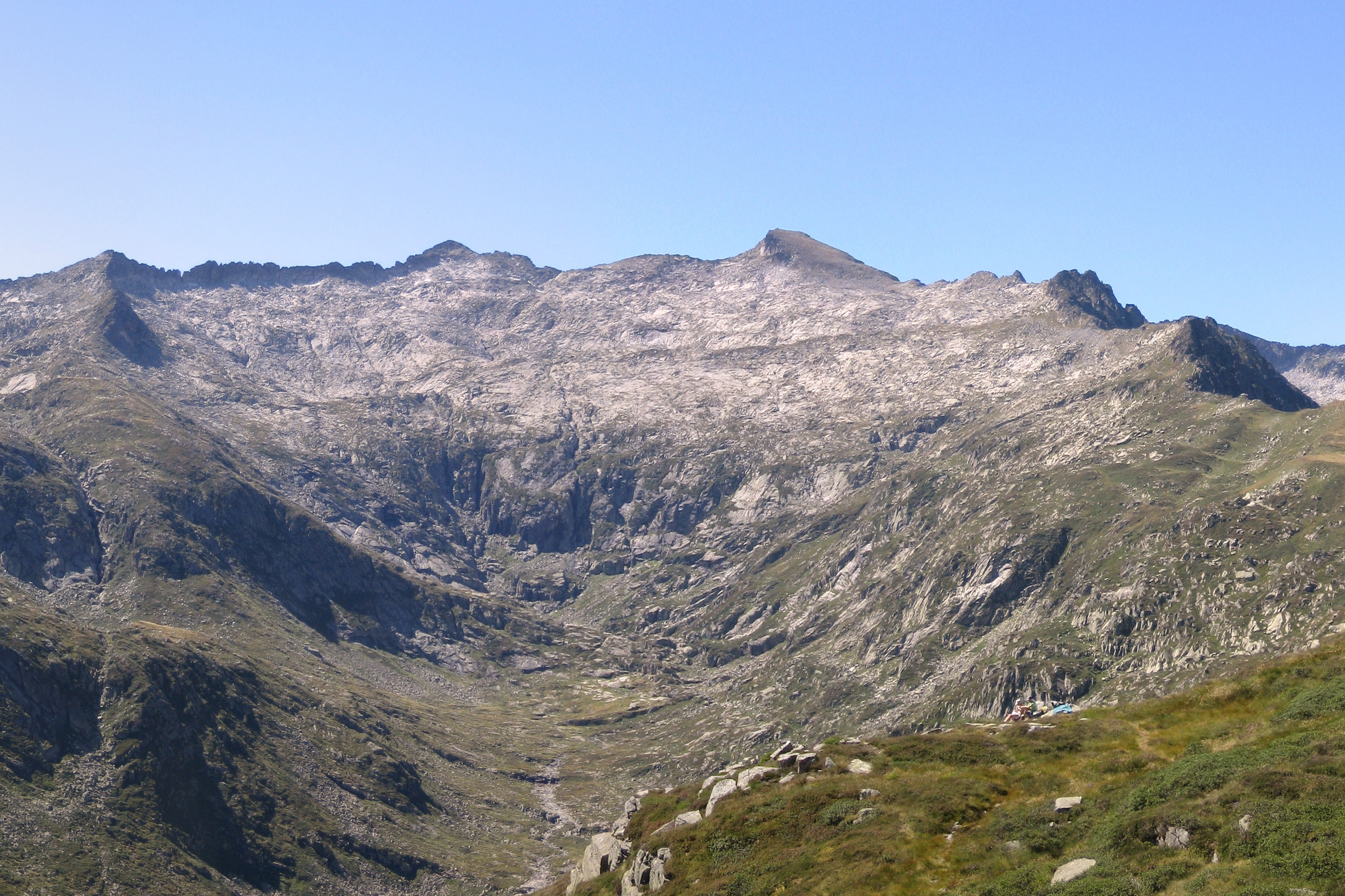 Pic Rouge de Bassiès - Assemblage de photos prises à proximité du Pic de Cabanatous.